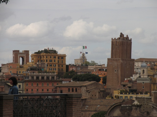 Torre delle Milizie, Roma, Italia